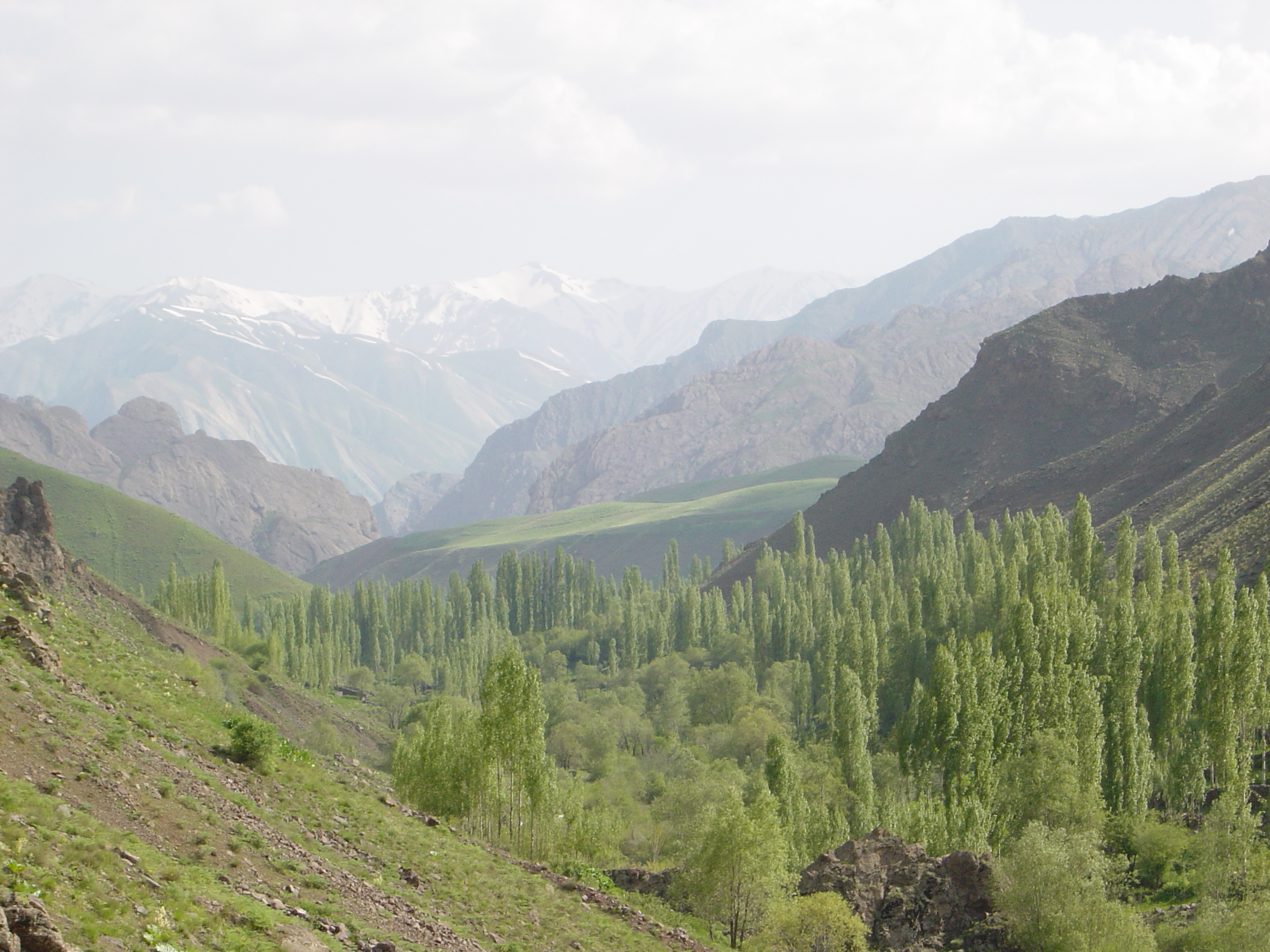 fdsdddd